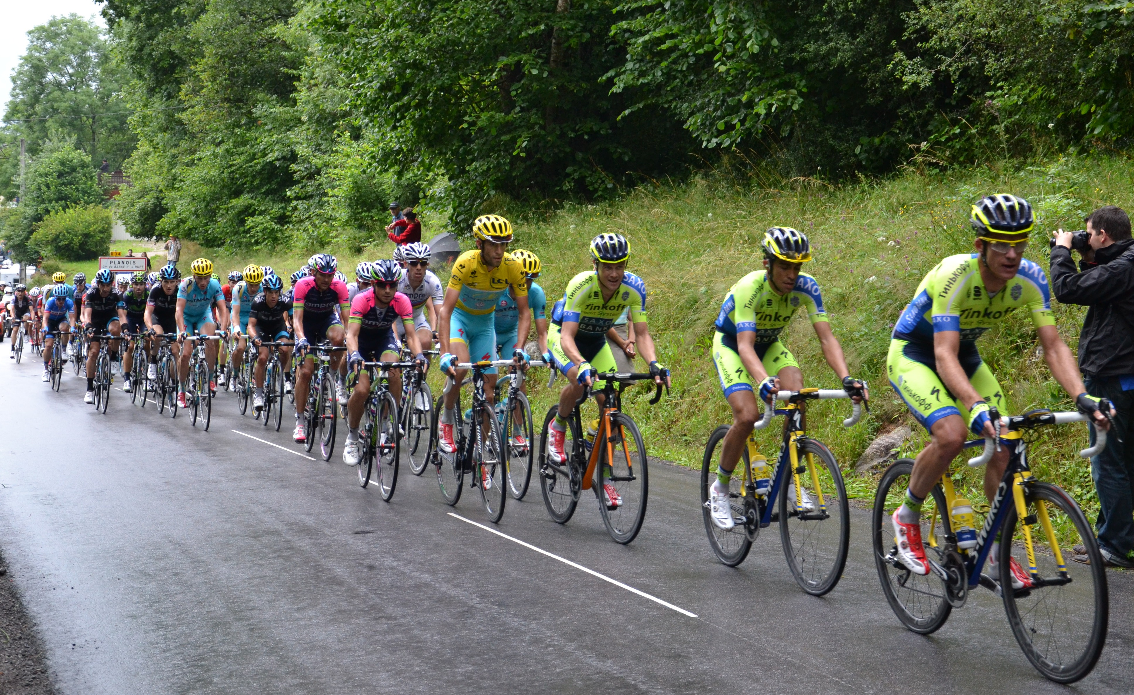 Le peloton dans la montée du col de la Croix des Moinats.